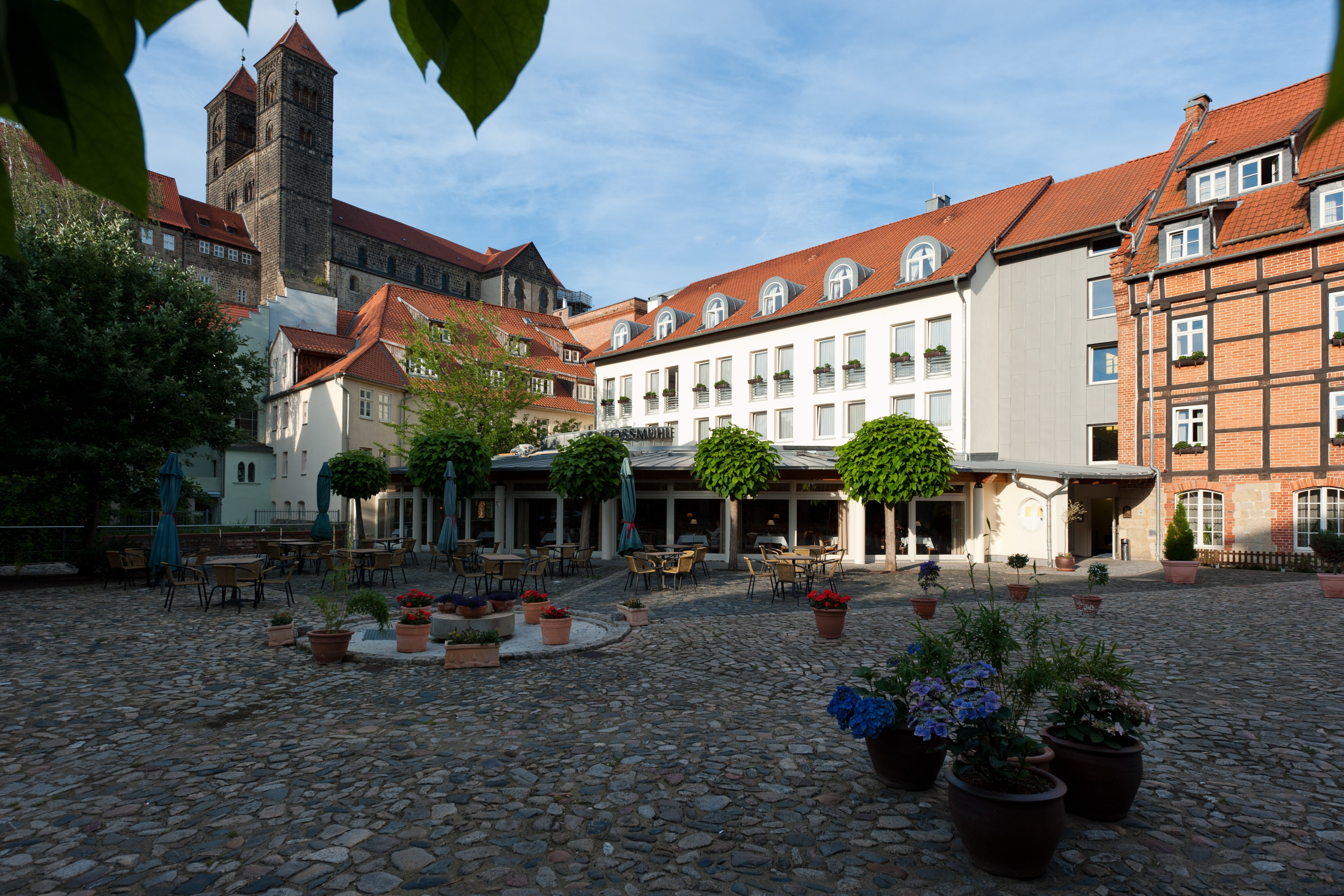 rechts die Schlossmühle Quedlinburg Blick auf das Stift